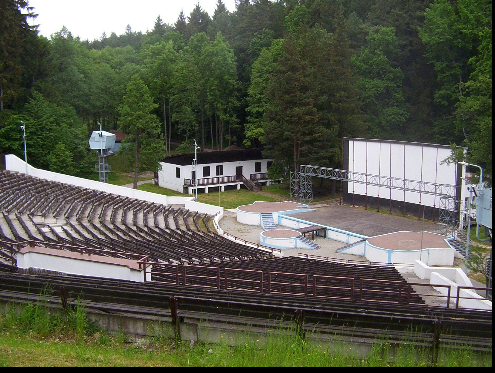 Amfiteáter v PKO Trnovce, Myjava(Note: not an amphitheatre!)